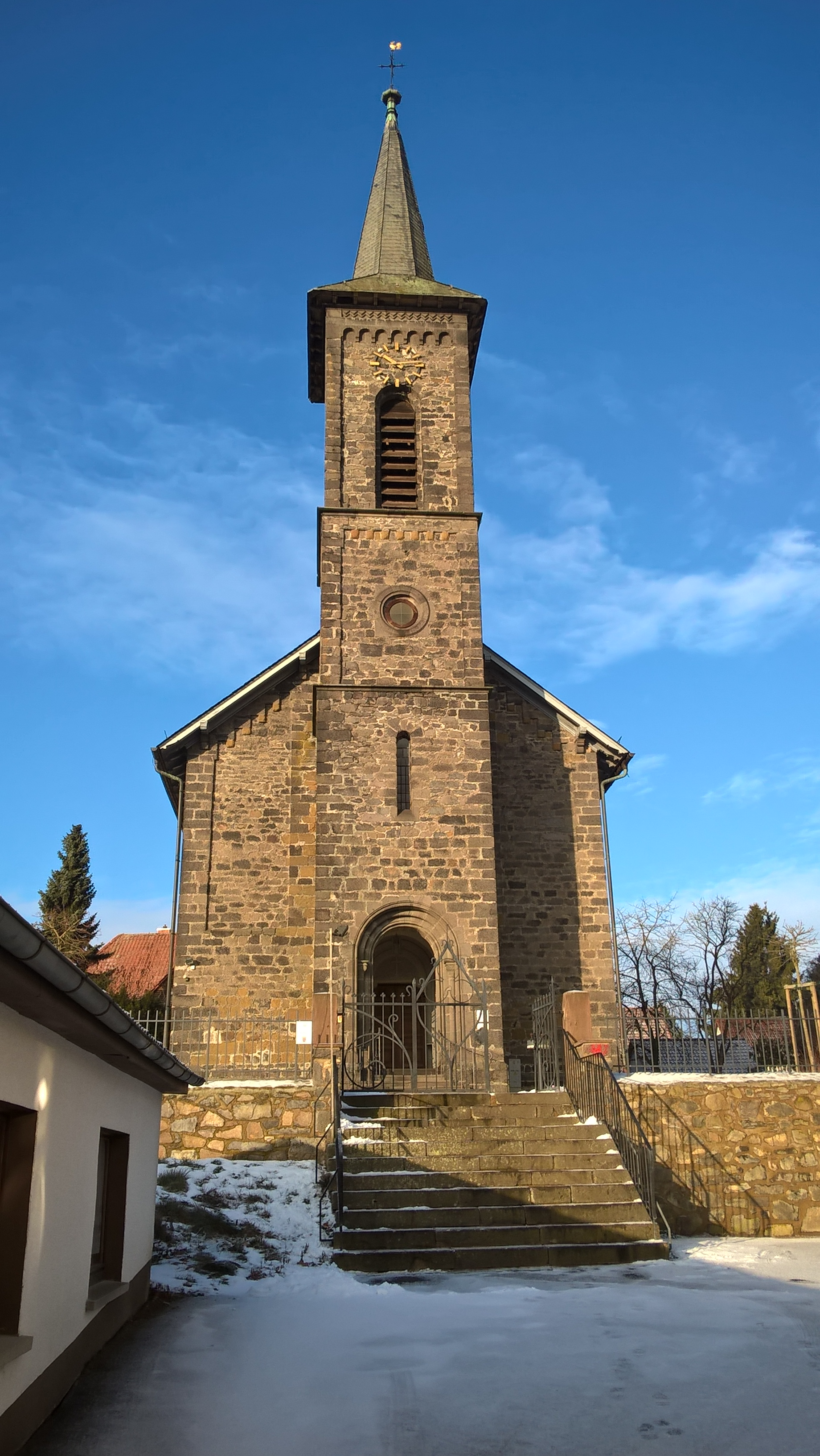 Evangelische Kirche Merlau, Gemeinde Mücke, Vogelsbergkreis, Hessen, Deutschland